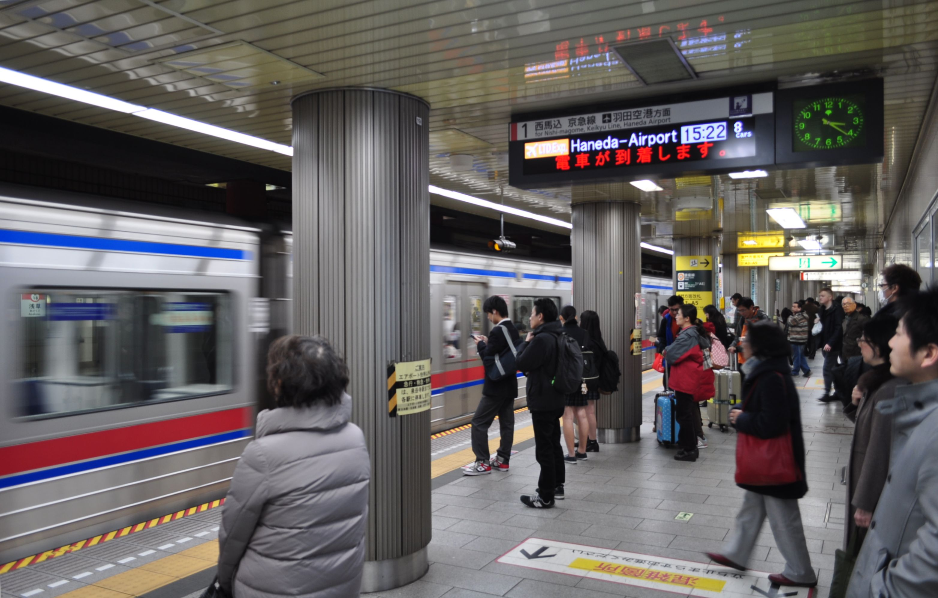 都営地下鉄 浅草駅ホーム